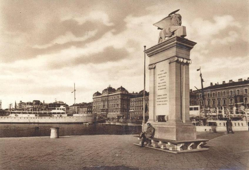 riva, nekad, italia